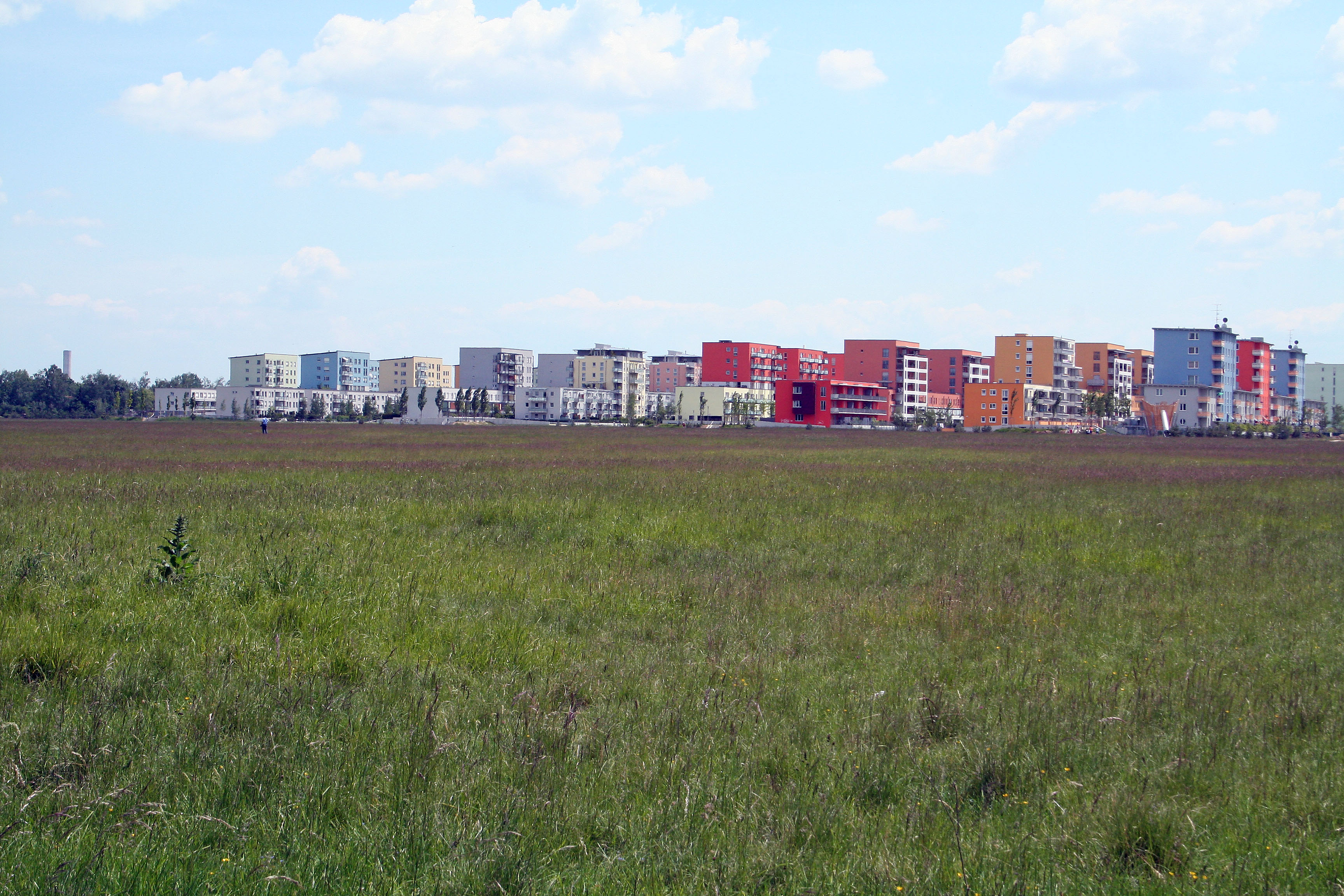 Neubaugebiet auf der südlichen Panzerwiese in München